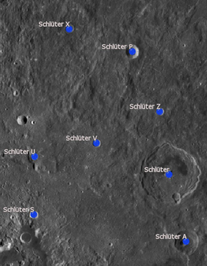 Cráter lunar Schlüter. Cráteres satélite. (Imagen LRO)